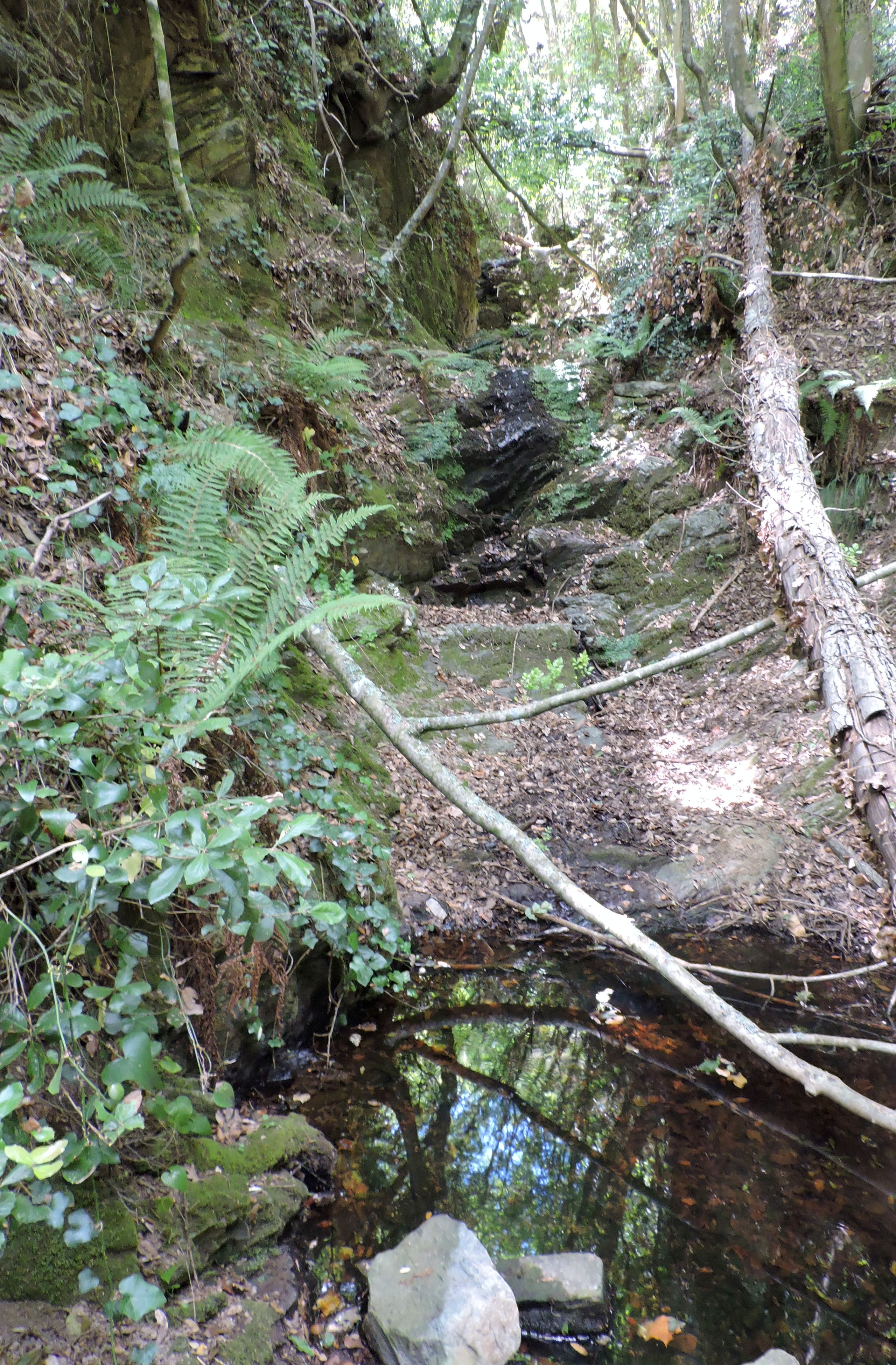 Punta Baffe - Punta Moneglia - Val Petronio (Q55317052)